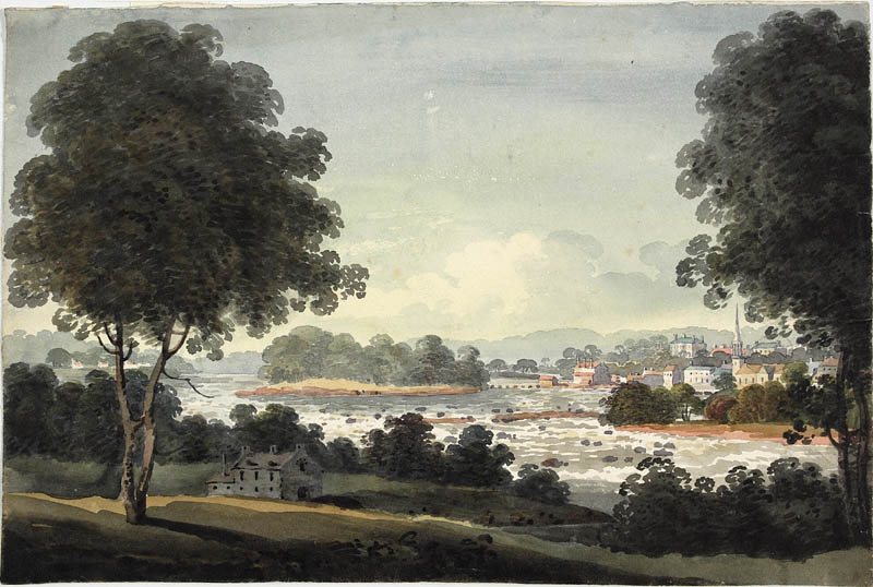 Terrebonne, Quebec